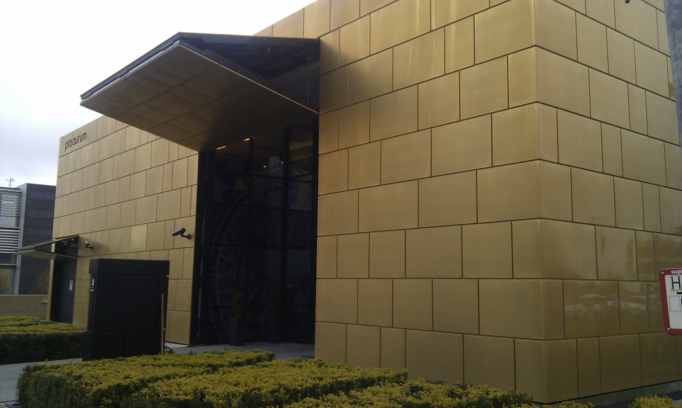 Das "Goldhaus", Unternehmenszentrale von pro aurum, München (Haupteingang)